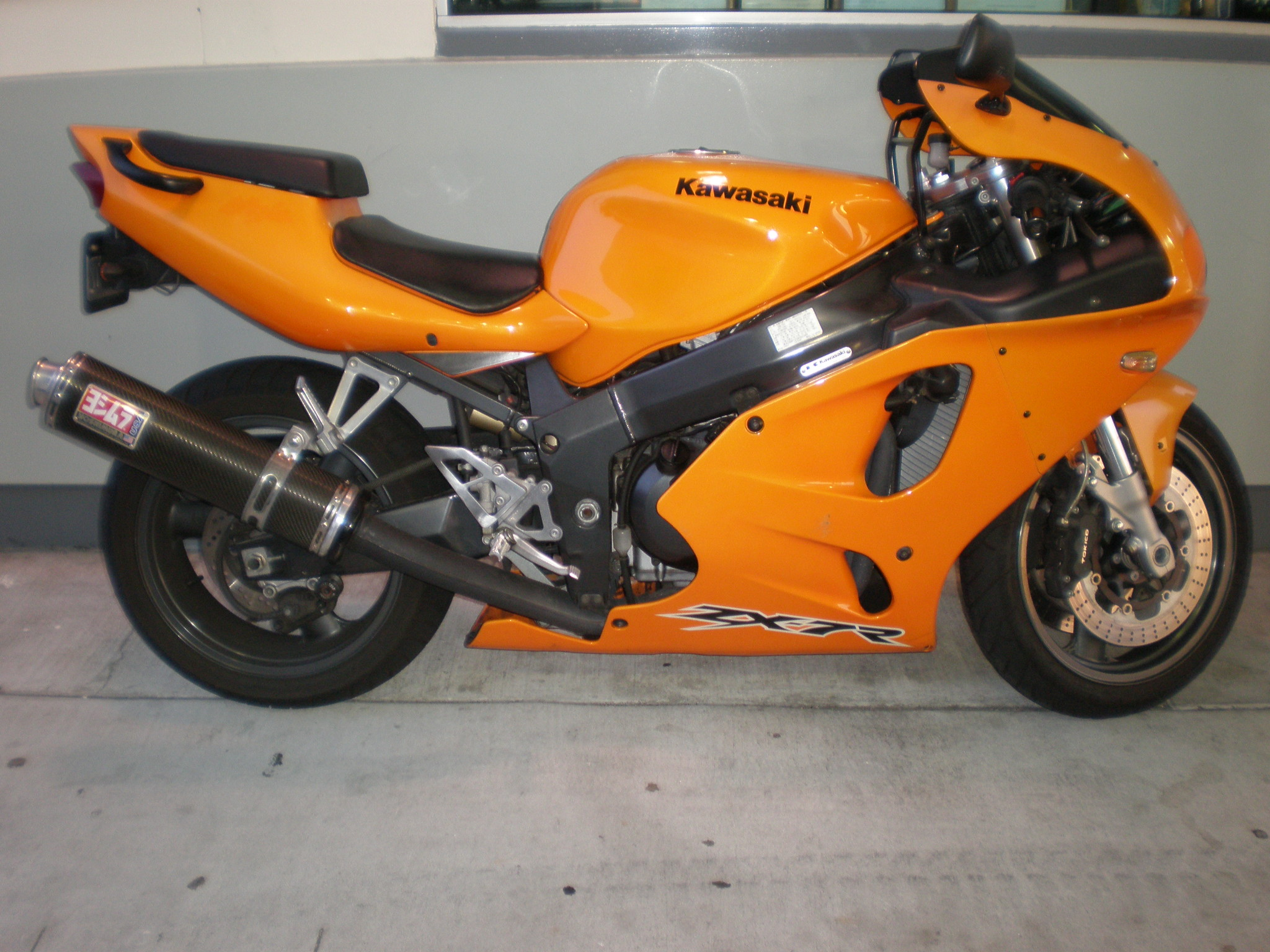 An orange Kawasaki ZX-7R